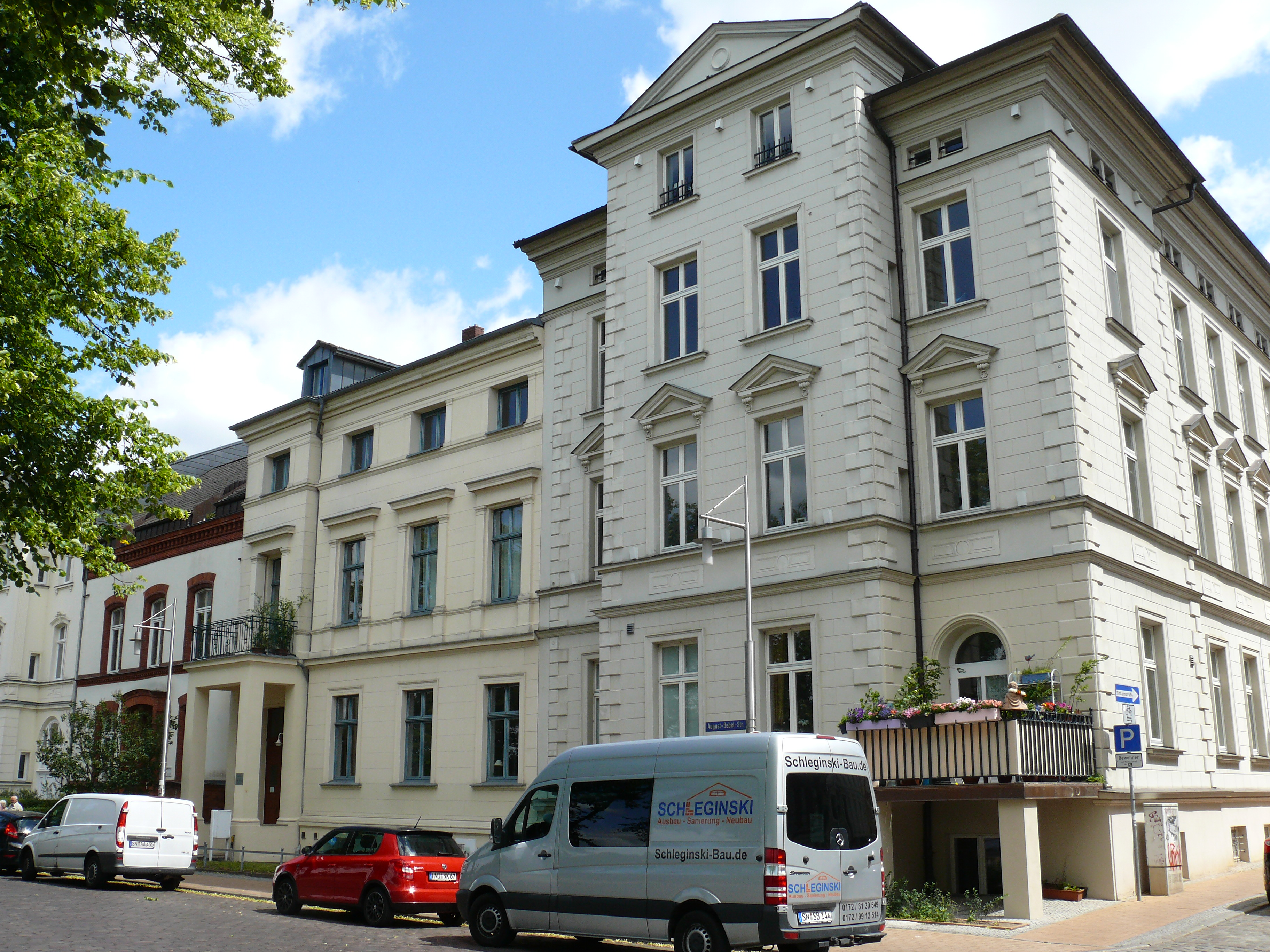 Die Gebäude "August-Bebel-Straße 6 (mittig) + 7 (links)" in Schwerin.